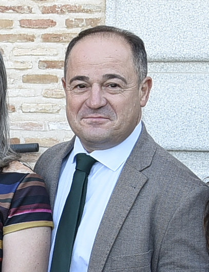 Toledo, 4 de octubre de 2018.- El presidente de Castilla-La Mancha, Emiliano García-Page, posa junto a la directora del Instituto de la Mujer, Araceli Martínez, diputados y diputadas regionales, y representantes de las asociaciones de mujeres, tras la aprobación en el Pleno de las Cortes regionales, del Proyecto de Ley para una Sociedad Libre de Violencia de Género en Castilla-La Mancha. (Fotos: José Ramón Márquez // JCCM)